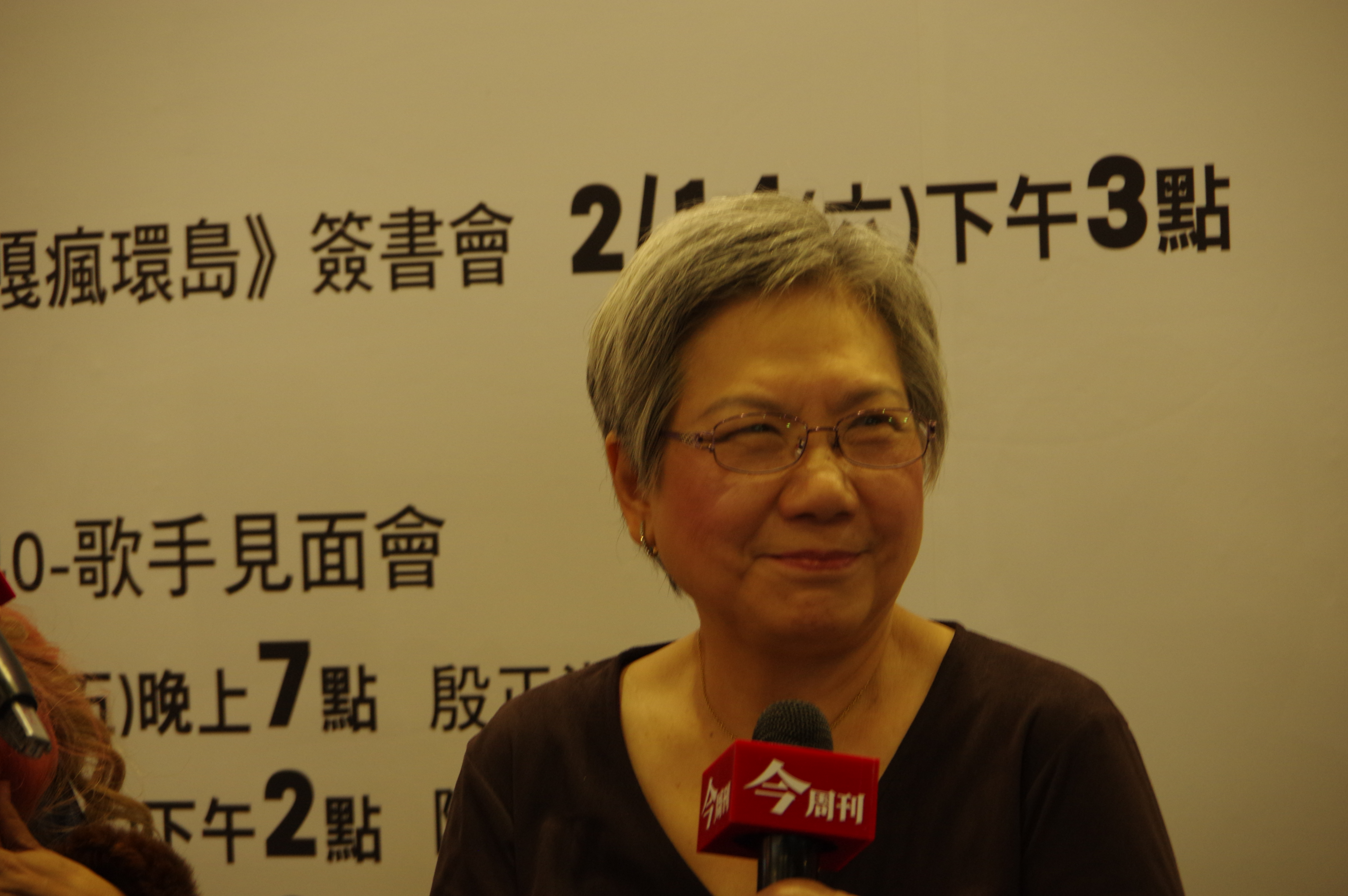 台灣廣播主持人陶曉清在2015台北國際書展《今周刊》攤位。